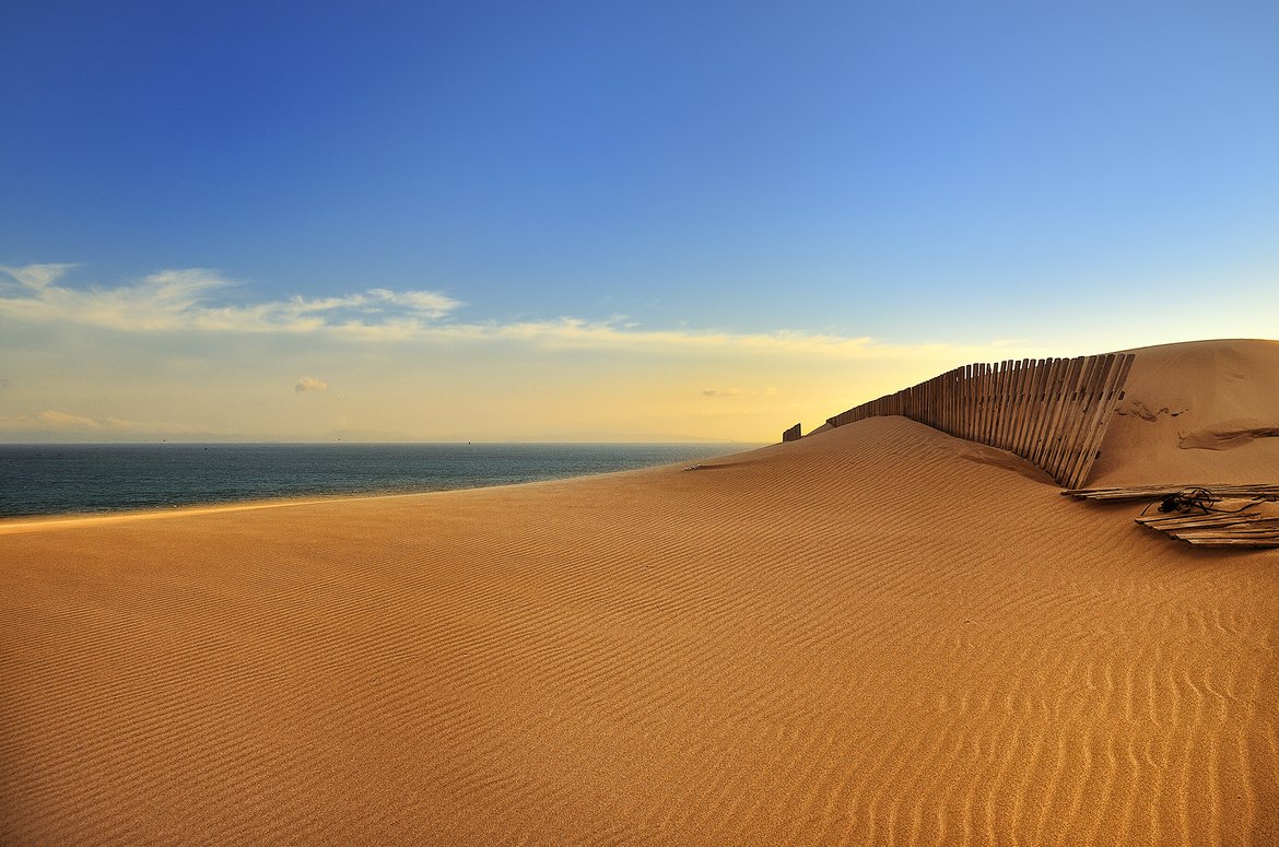 Spiaggia di Bolonia, nel comune di Tarifa, in Spagna.